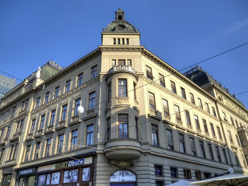 Zagreb